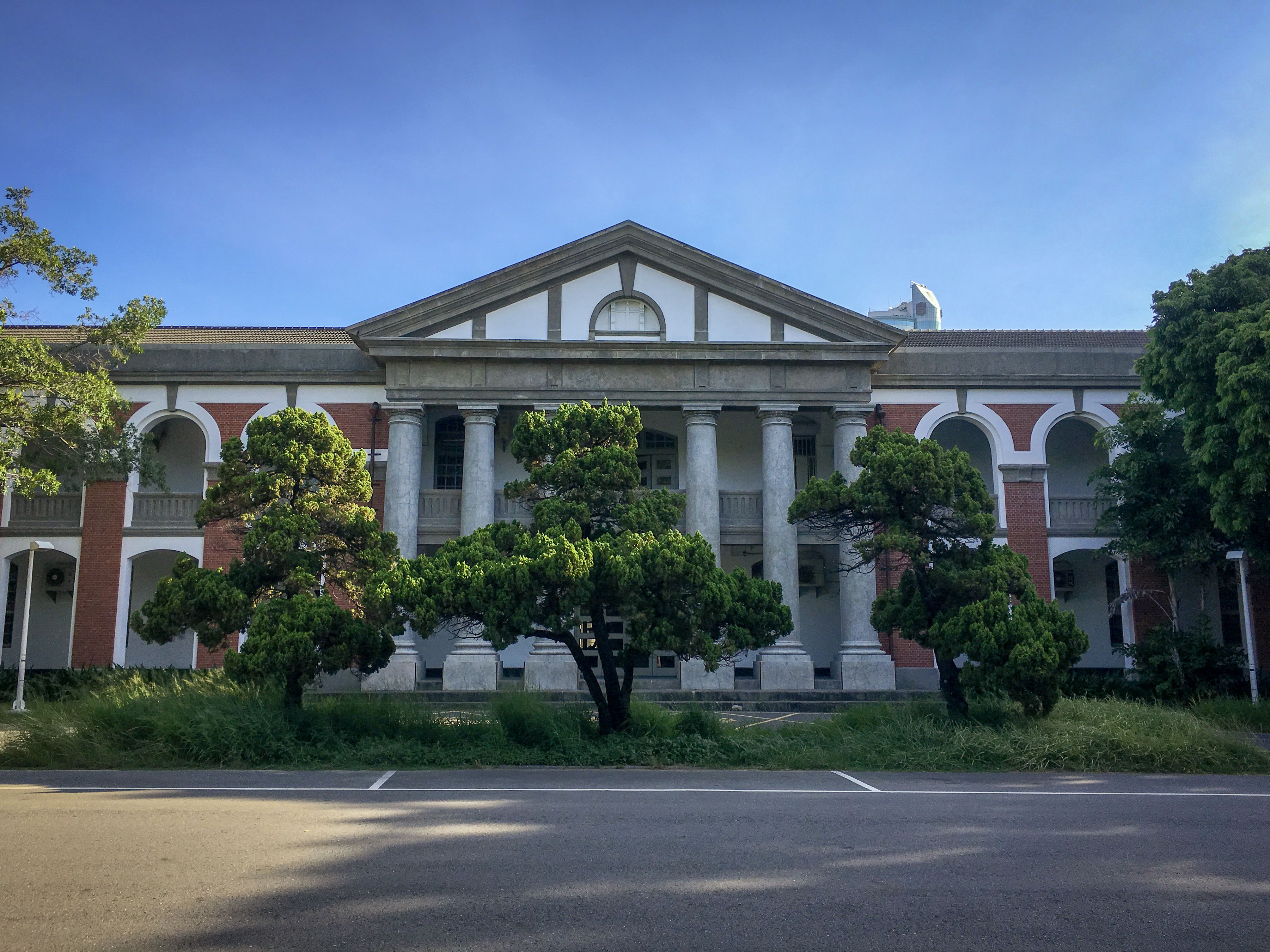 原日軍步兵第二聯隊營舍，今成功大學大成館（工設系館）之北面。